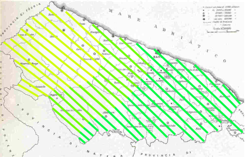 Questa cartina mostra i due gruppi di dialetti del barese e la zona di transizione.